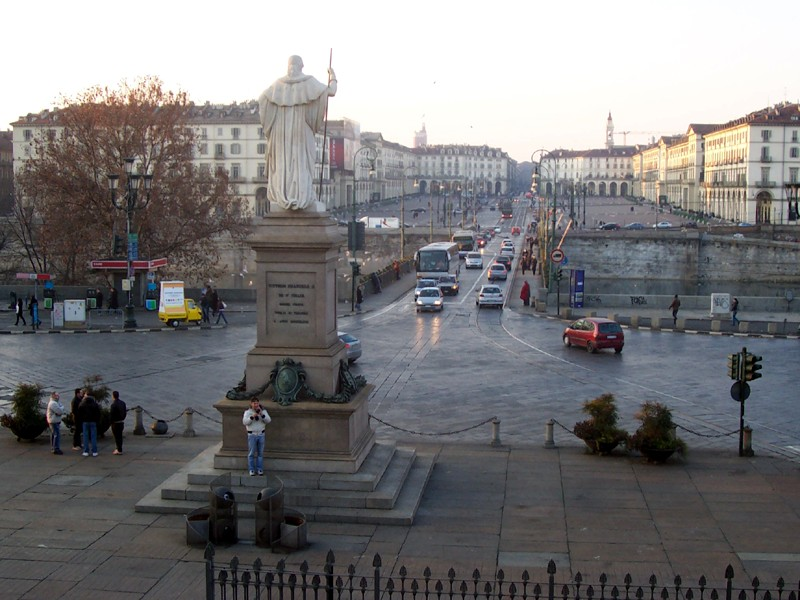 Torino - Piazza Vittorio Veneto vista dalla Chiesa della Gran Madre di Dio.